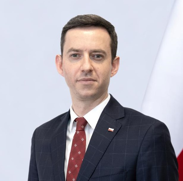 Marcin Ociepa, wiceminister ON